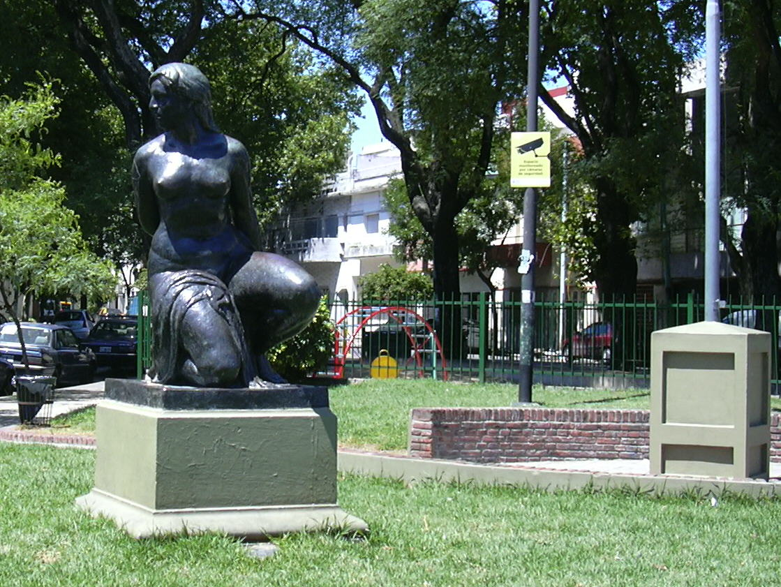 Plazoleta "Vicente Bellini" de Villa Luro - Vista parcial, con la estatua "La Cautiva" de Santiago Chiérico.